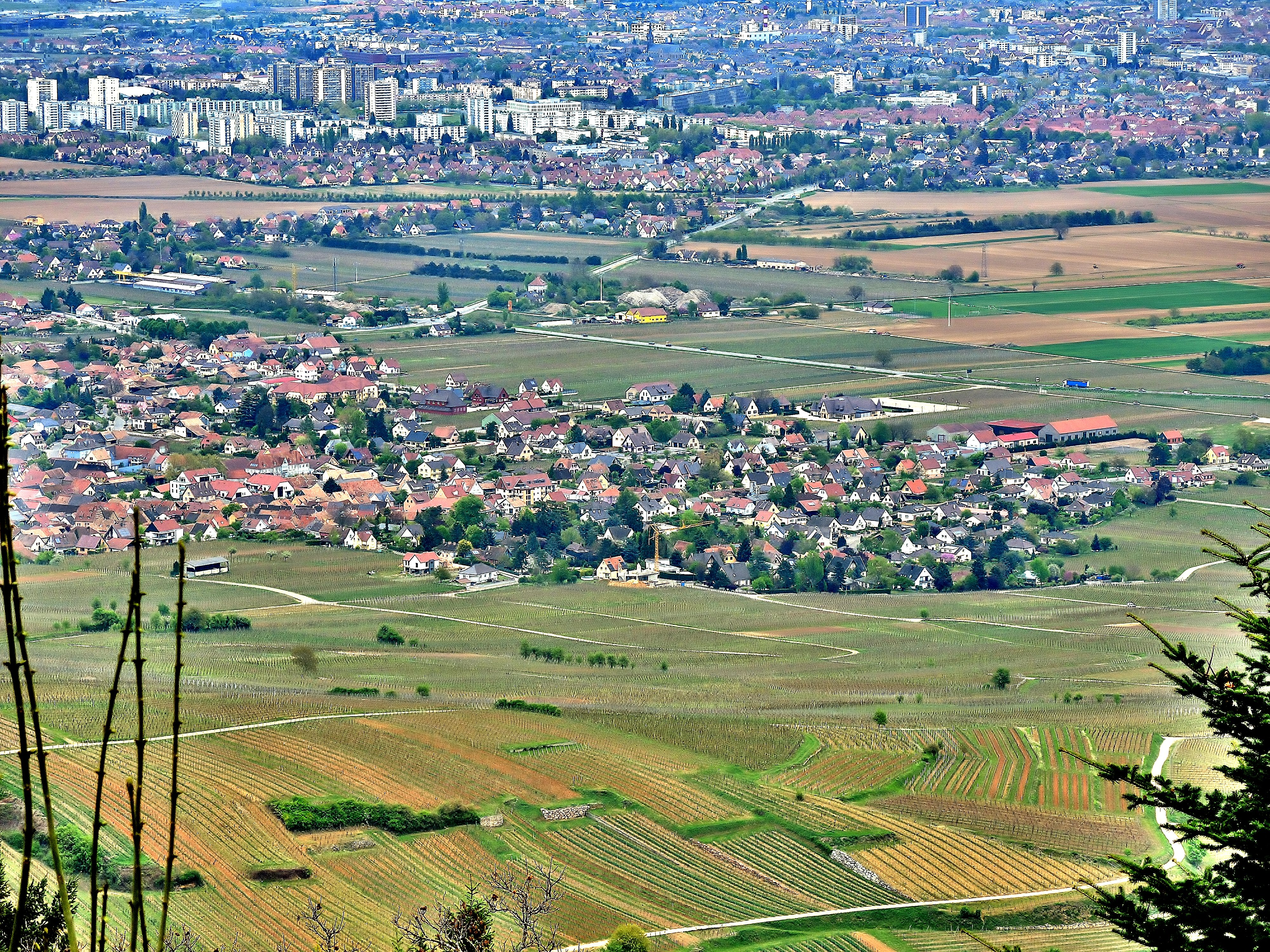 Panorama depuis la cour des trois châteaux.